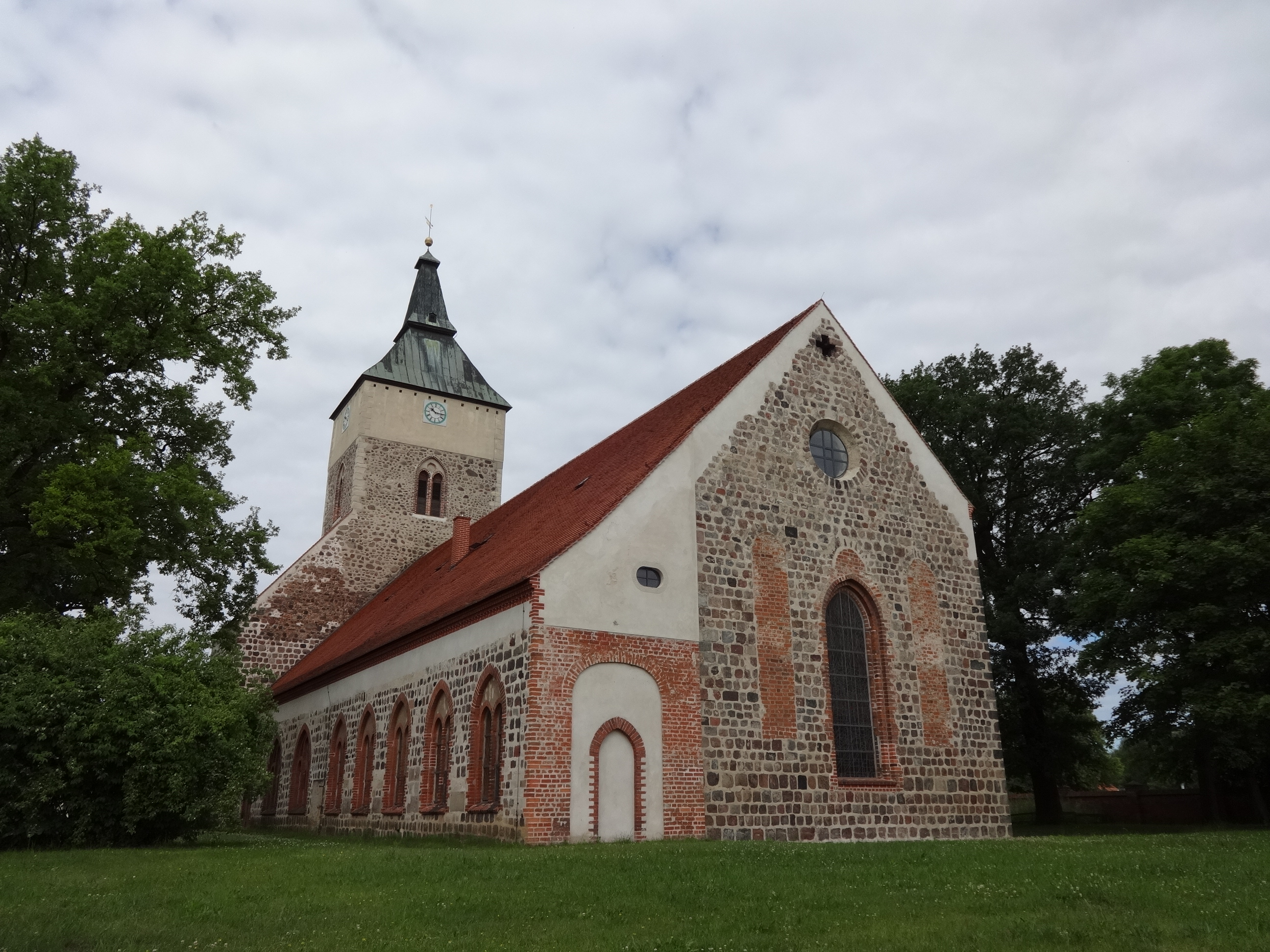 Stadtpfarrkirche aus dem 13. Jahrhundert in Altlandsberg, Landkreis Märkisch-Oderland, Brandenburg